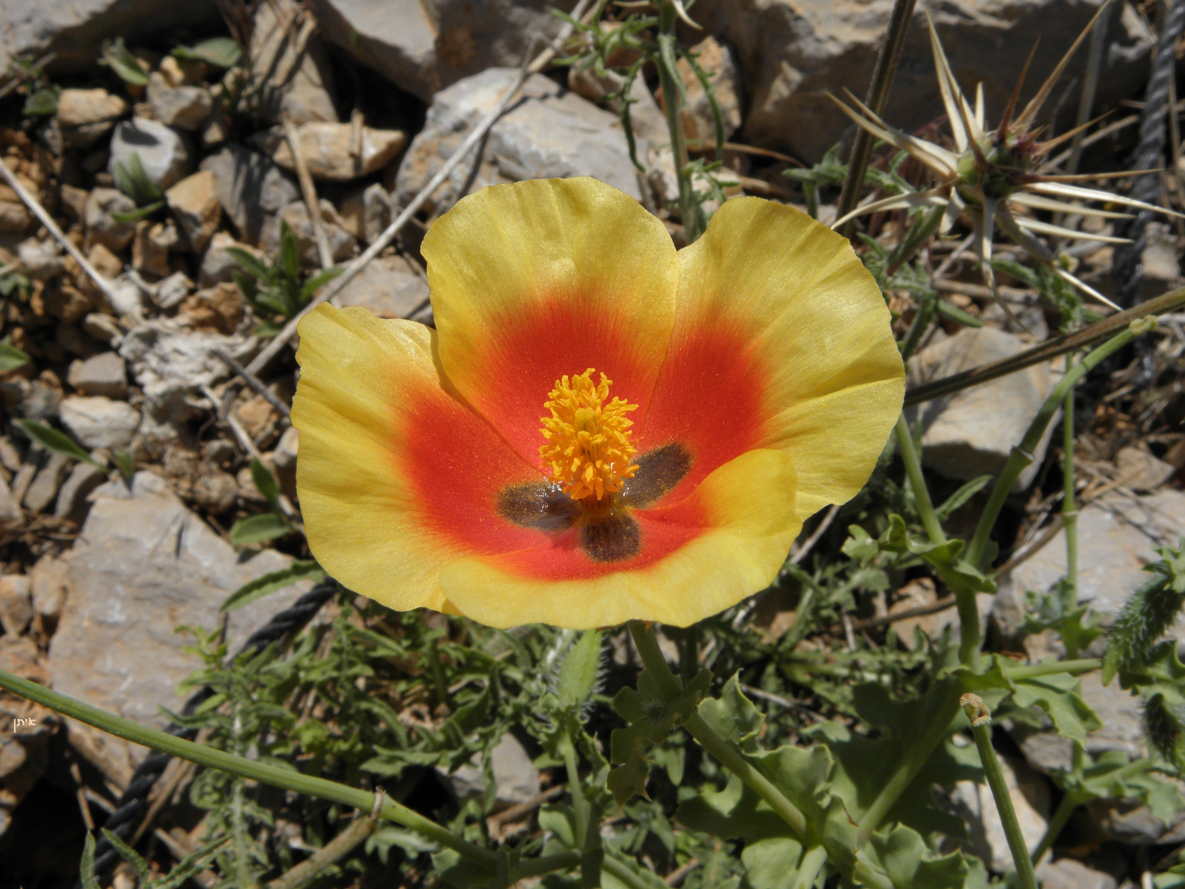 Glaucium oxylobum (Glaucium leiocarpum Boiss.) - mount Hermon פרגה קרחת - החרמון